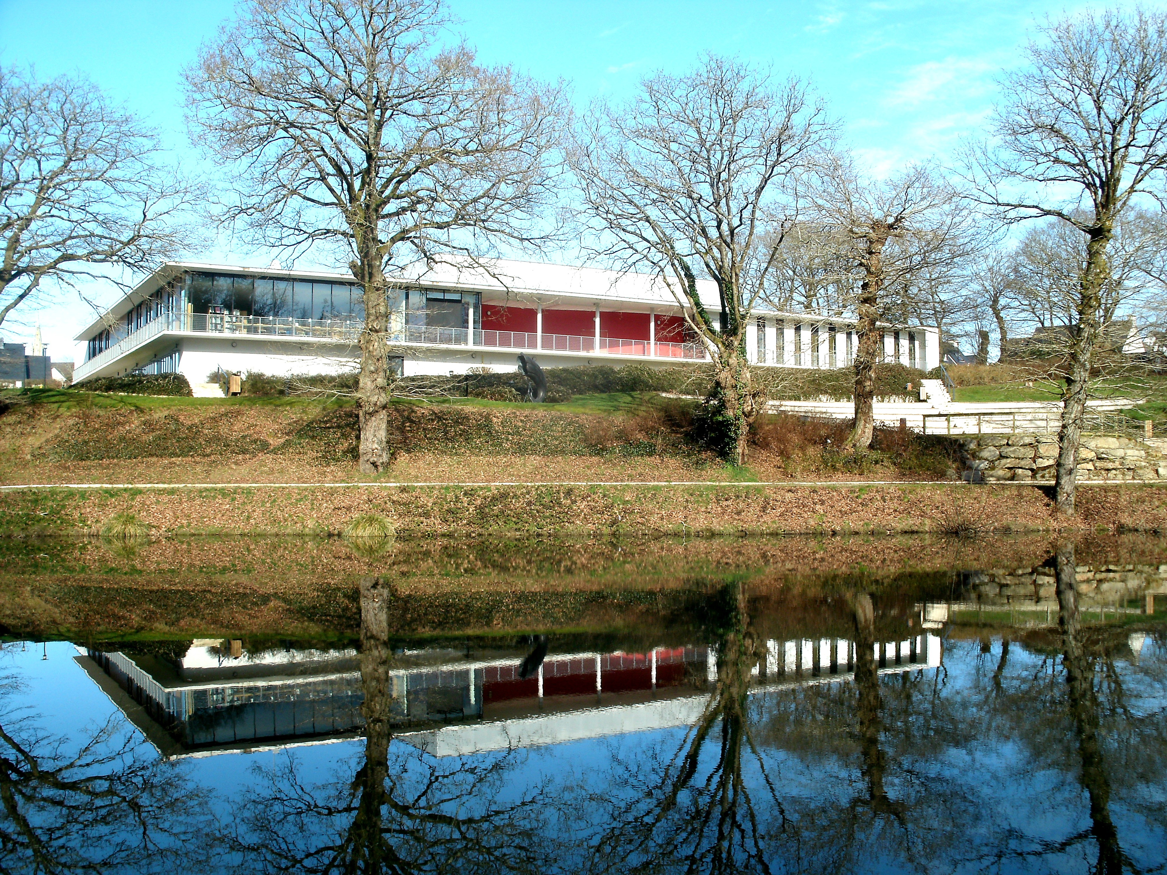 Façade sud de l'Espace des médias et des arts de Languidic ; au premier plan, l'étang de Poulvern.